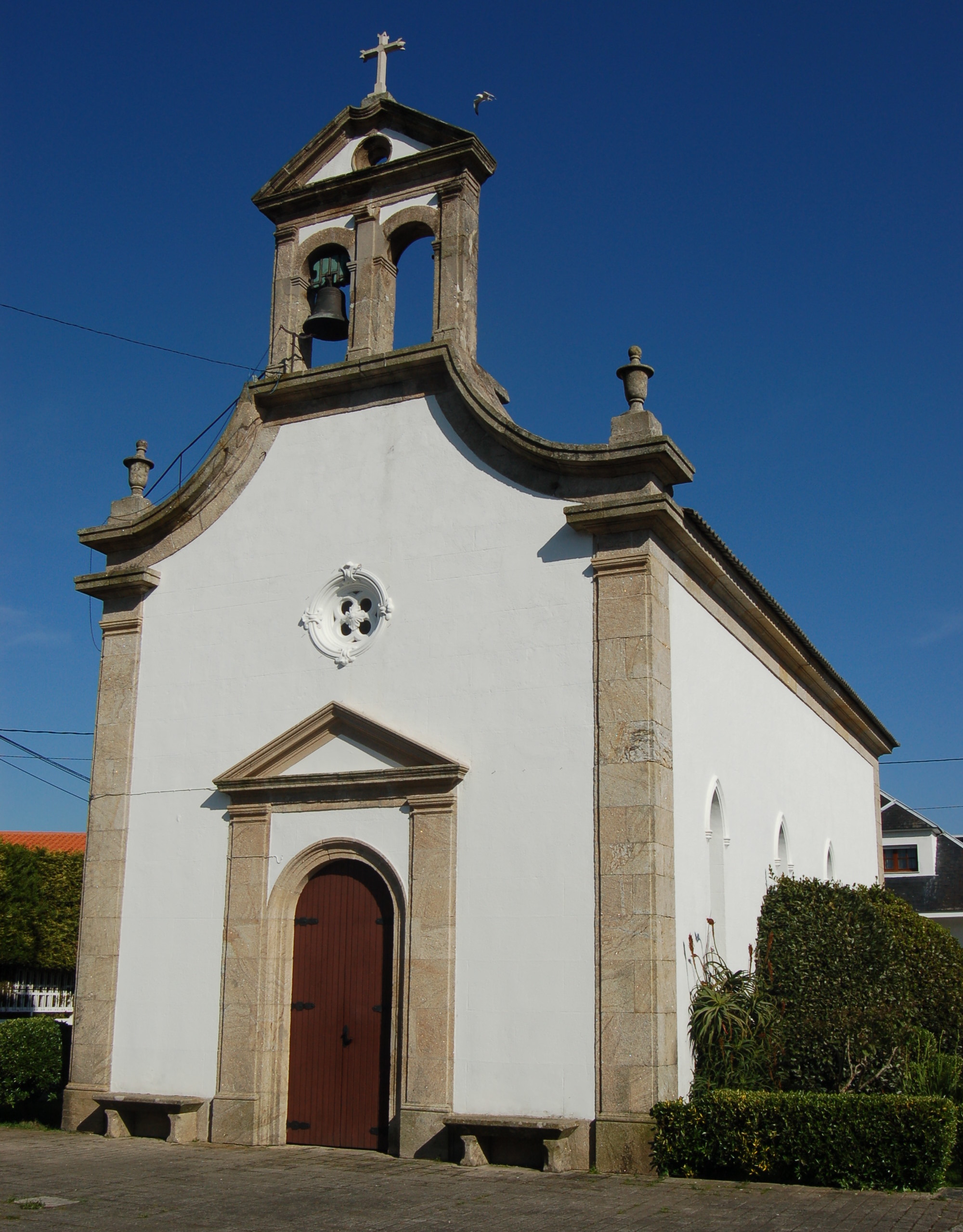 capela de San Antoniño na Caeira (Poio)